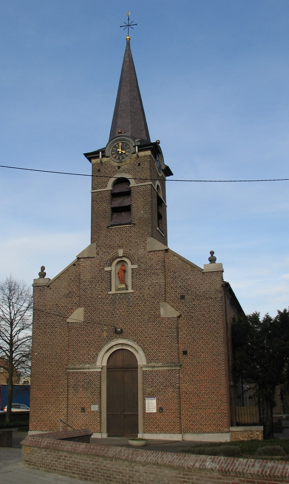 kerk in Guigoven, België